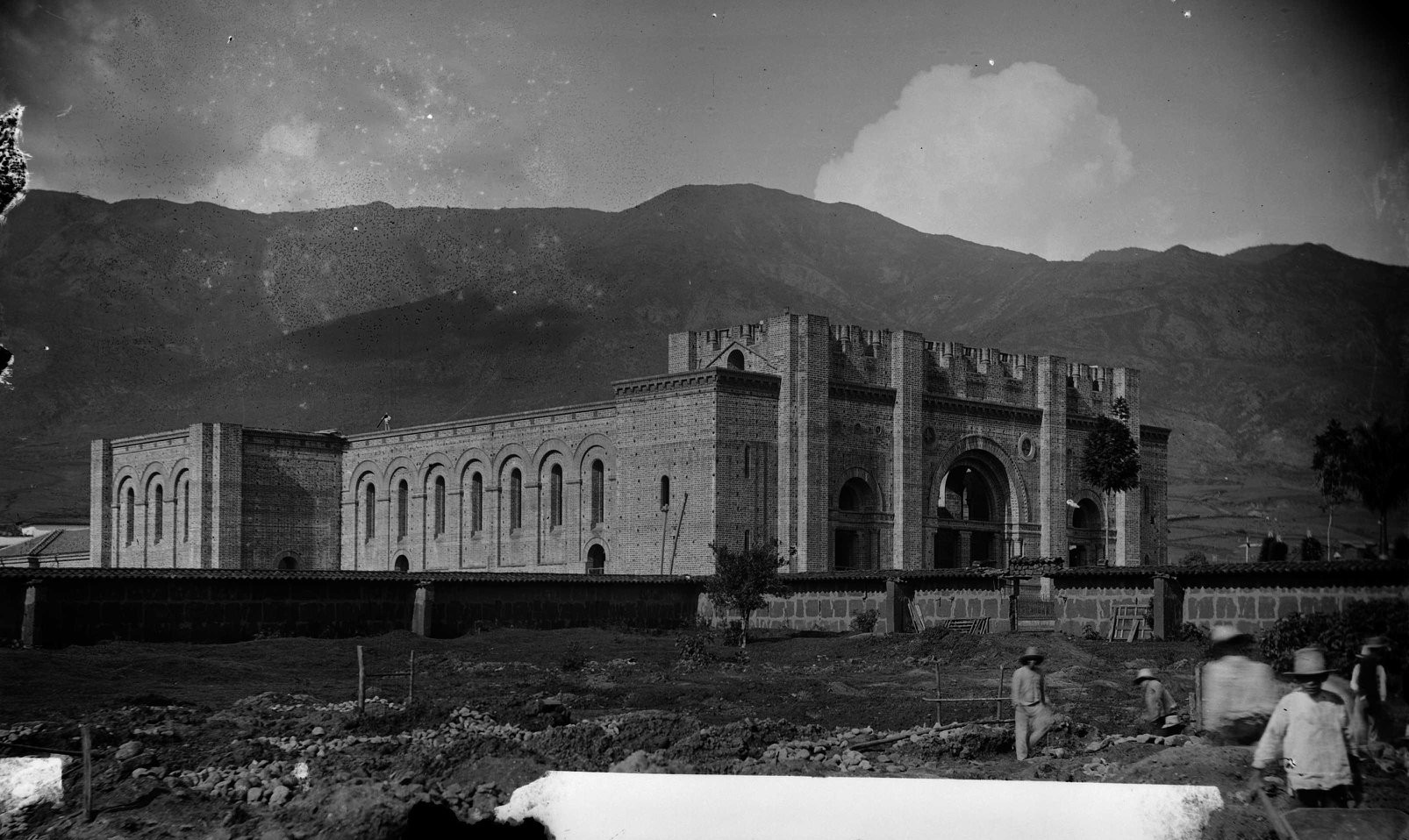 Catedral Metropolitana de Medellín en construcción alrededor de 1895, Colombia.